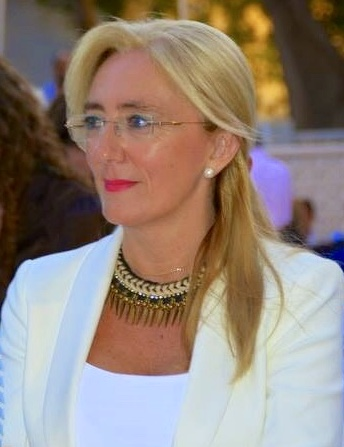 politica